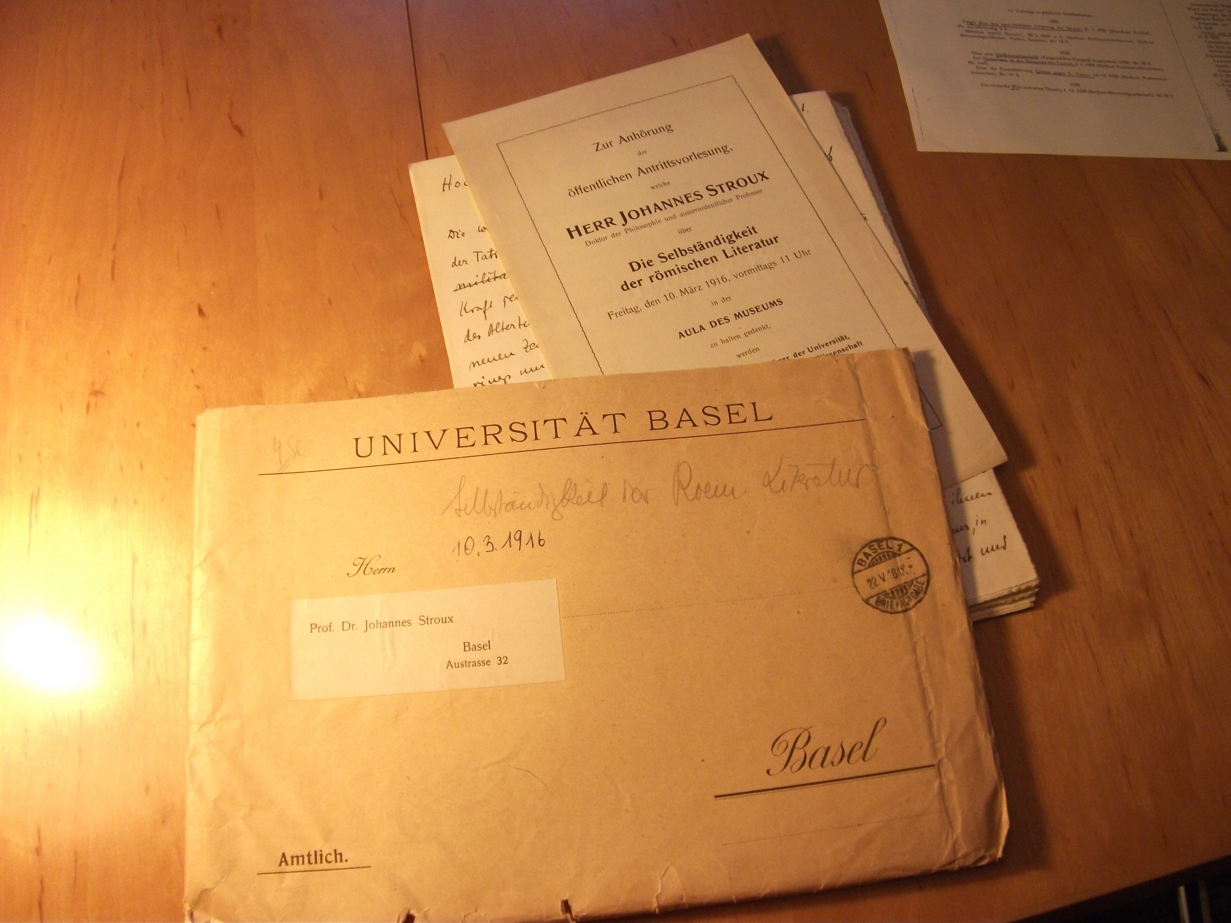 Prof. Johannes Stroux: Einladung zur Antrittsvorlesung in Basel am 3. März 1916 zum Thema 'Die Selbstständigkeit der römischen Literatur' mit Postumschlag der Uni Basel.